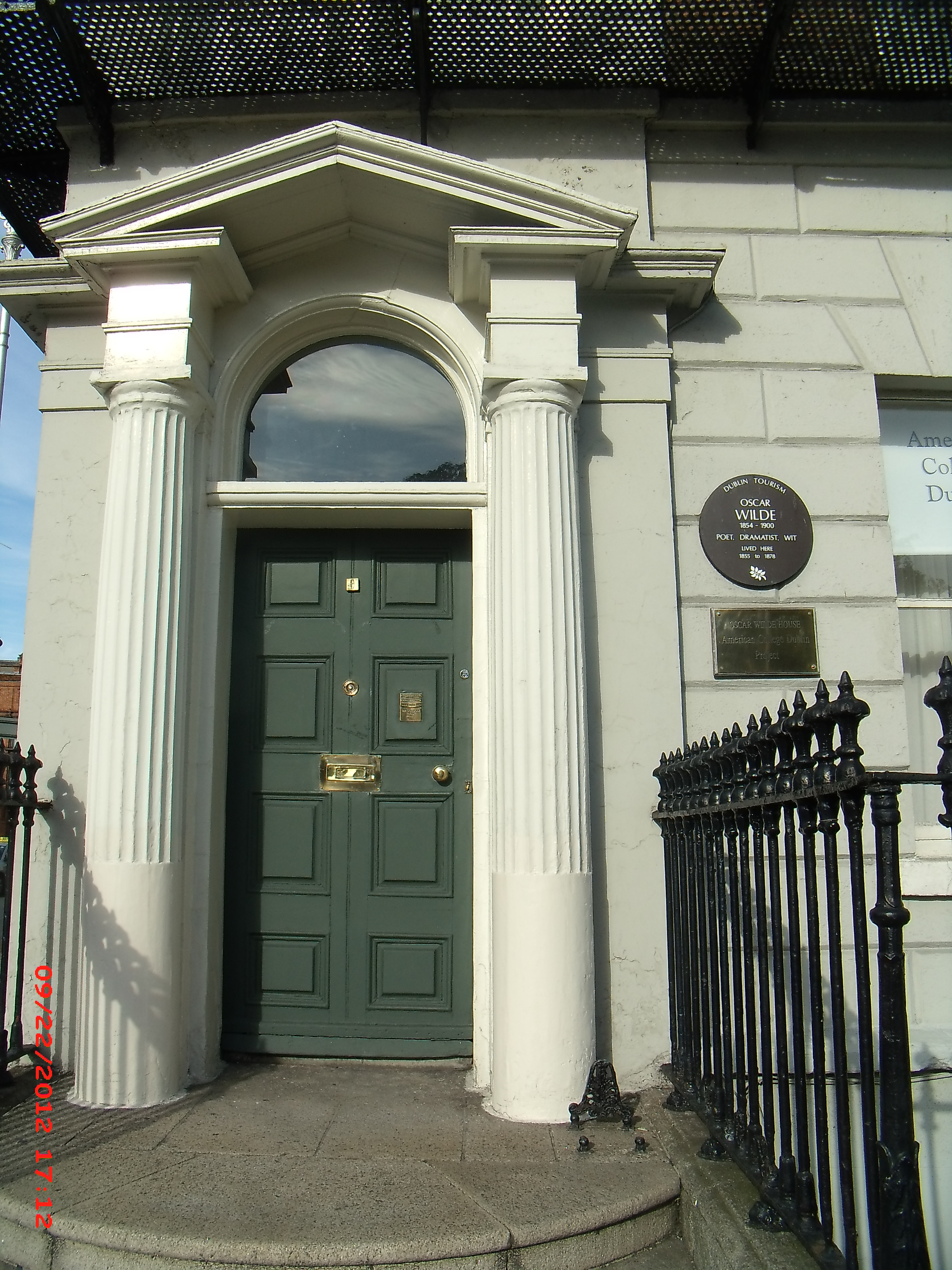 Entrée monumentale de la maison natale d'Oscar Wilde à Dublin (1, Merrion Square)